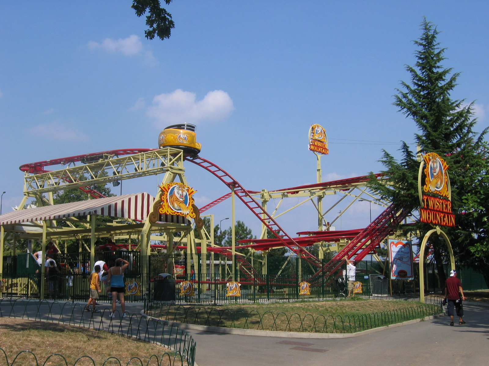 Twister Mountain - Minitalia Leolandia Park